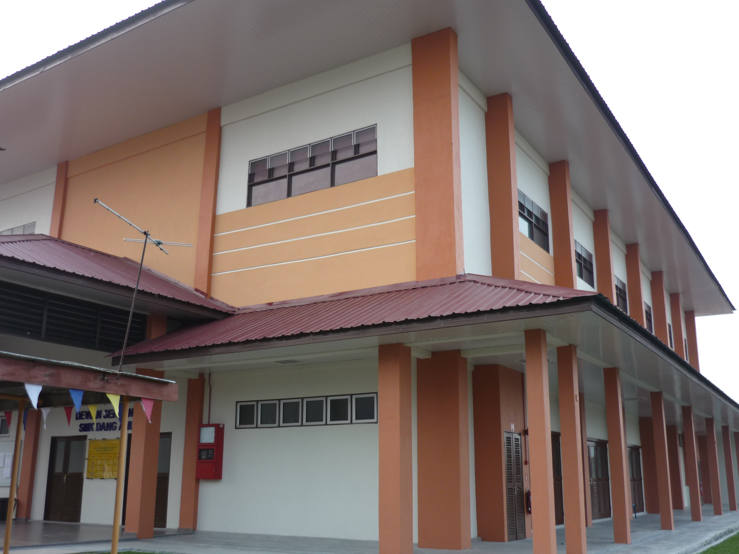 Pandangan Tepi Dewan Seri Anum